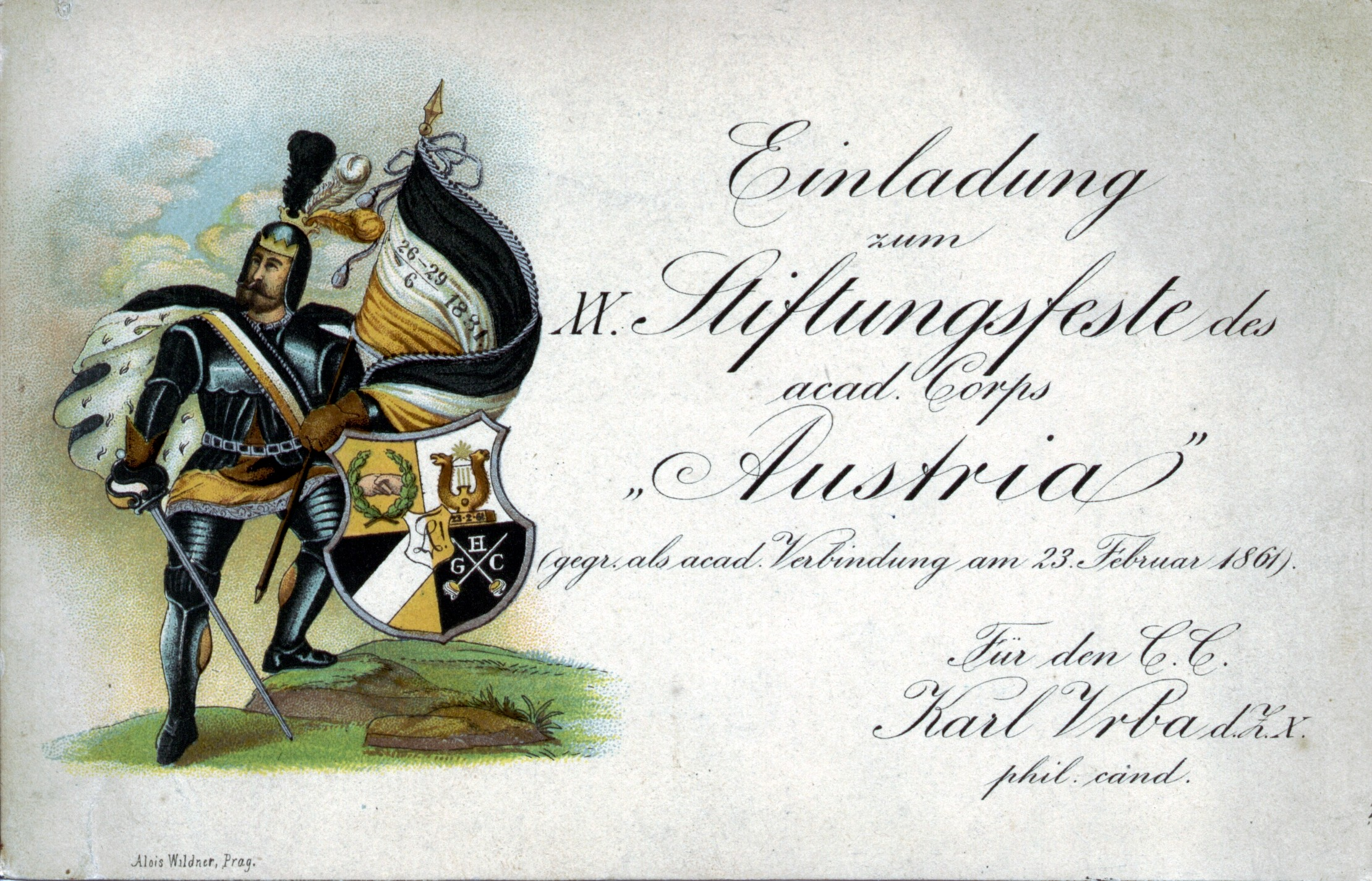 Stiftungsfesteinladung 1881